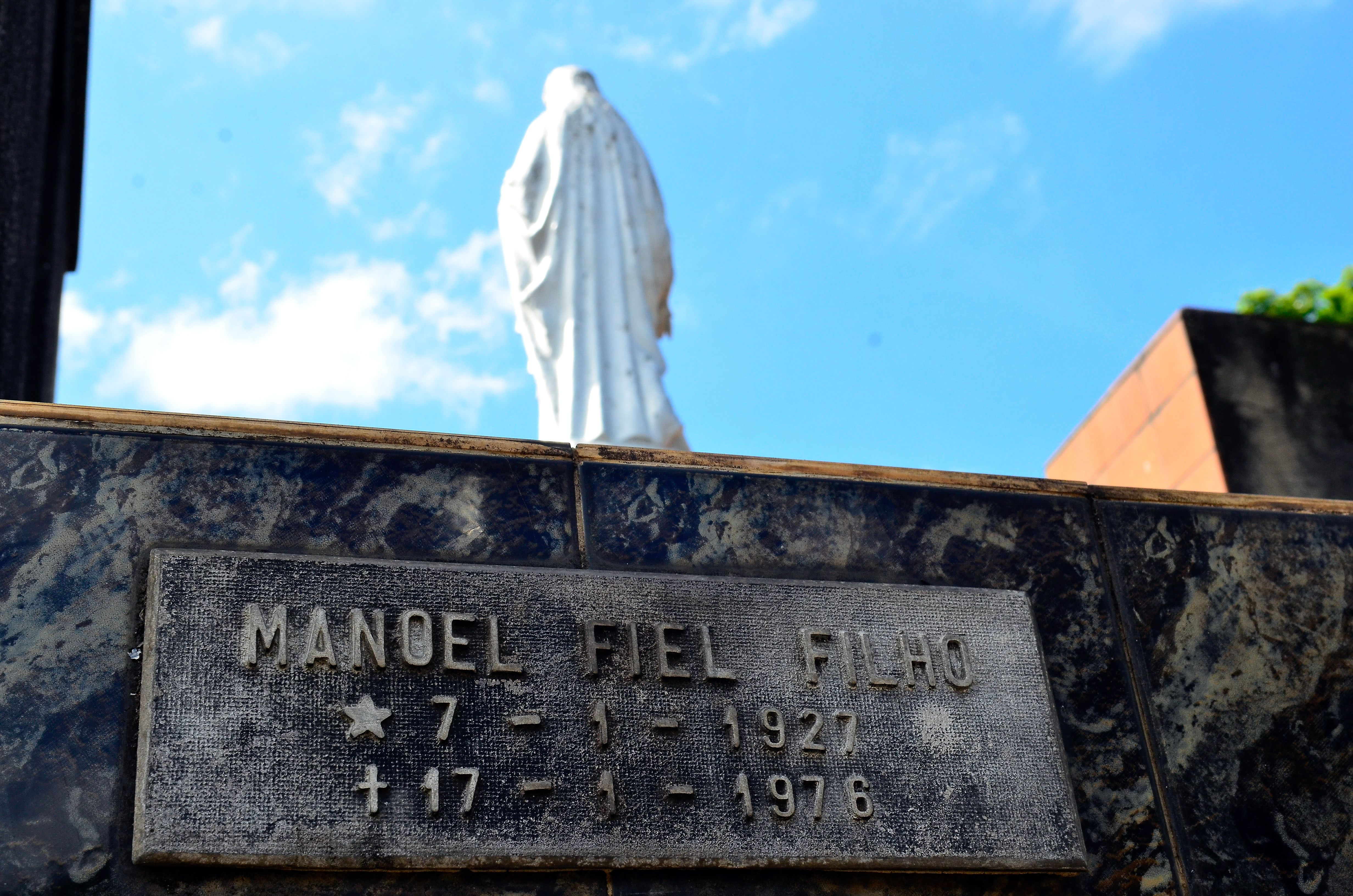 São Paulo - Lápide do metalúrgico Manoel Fiel Filho, militante político torturado e morto durante a ditadura civil-militar, no Cemitério Quarta Parada, em São Paulo (Rovena Rosa/Agência Brasil)